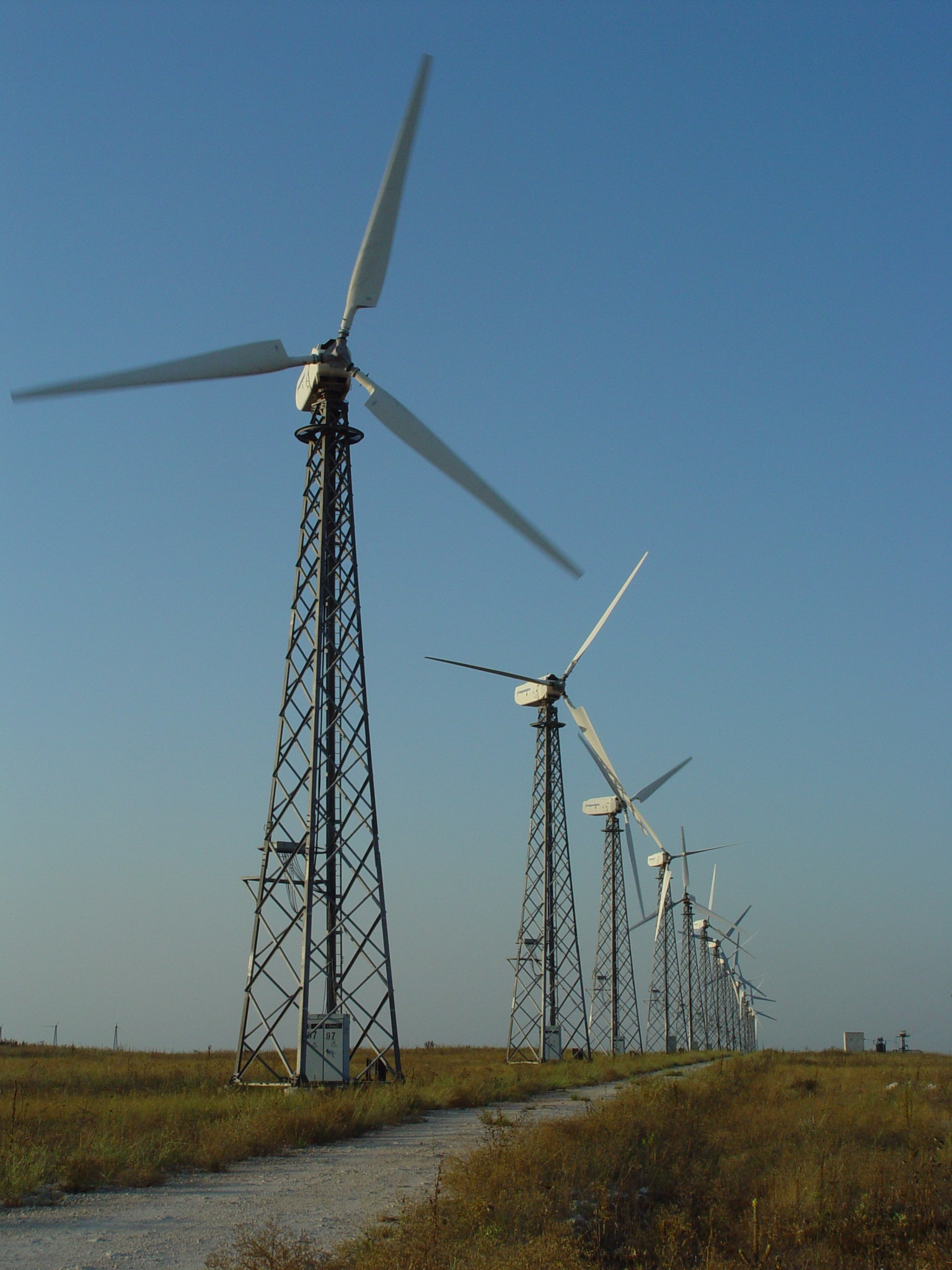 Малі вітрогенератори Тарханкутської вітряної електростанції.